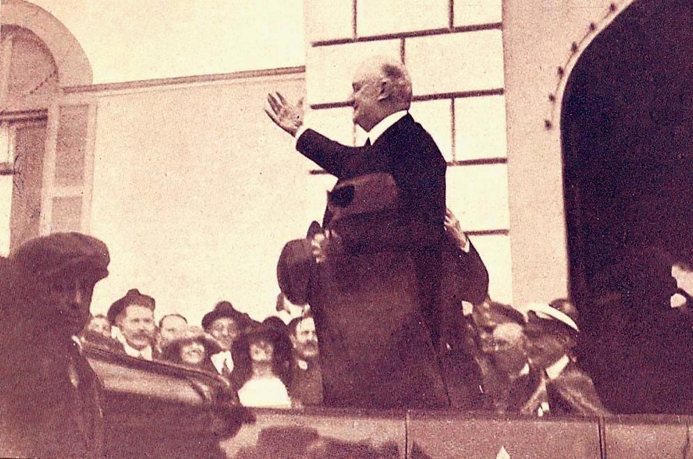 Alvear en 1923 en el Colegio Nacional Histórico de Concepción de Uruguay, siendo Presidente de la Nacion.